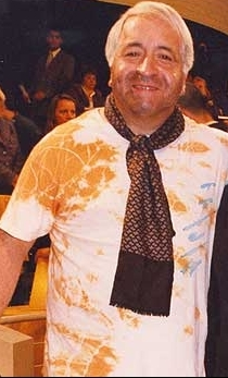 Humorista chileno Jorge Franco.